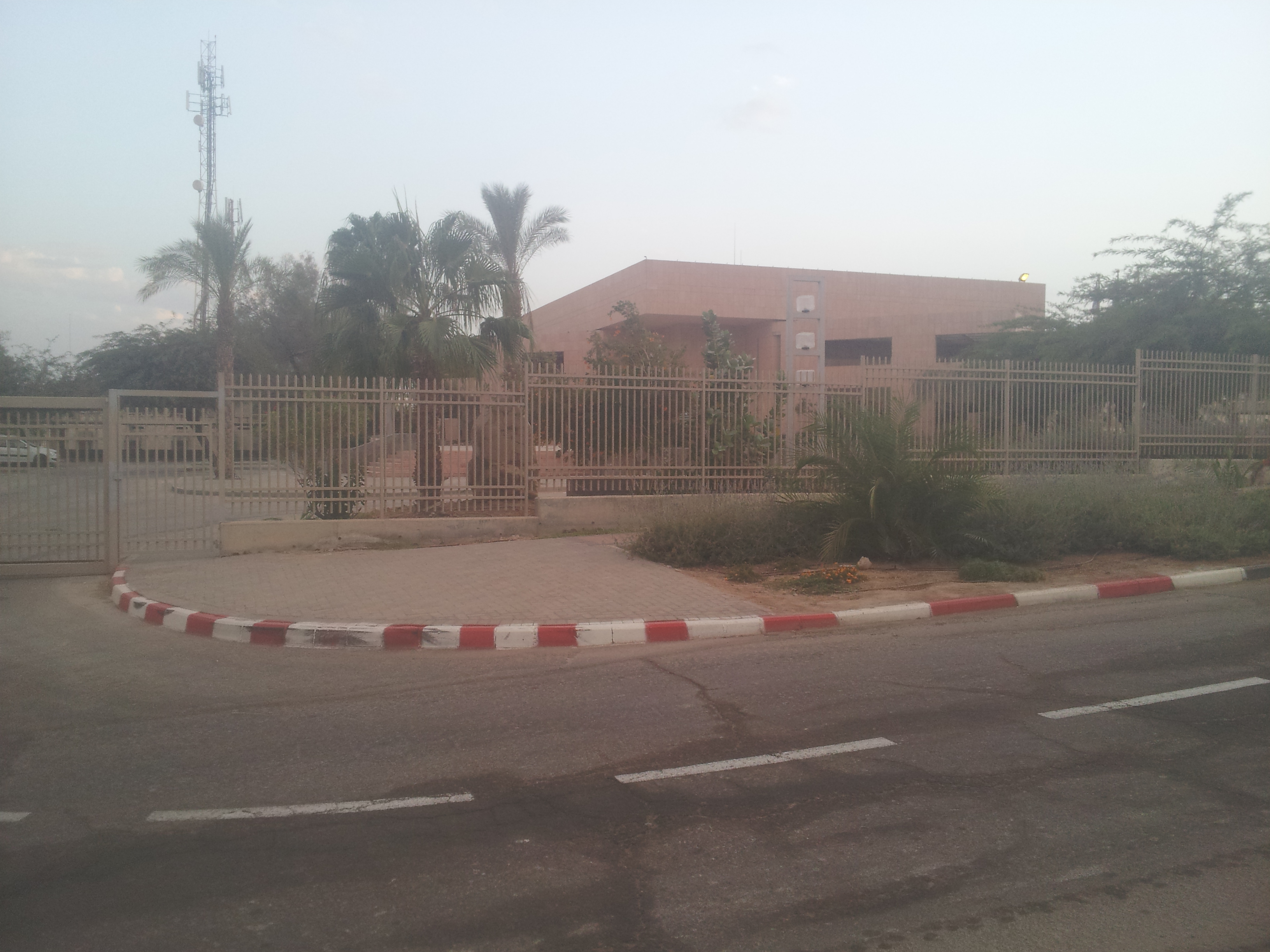 בניין המועצה האזורית תמר